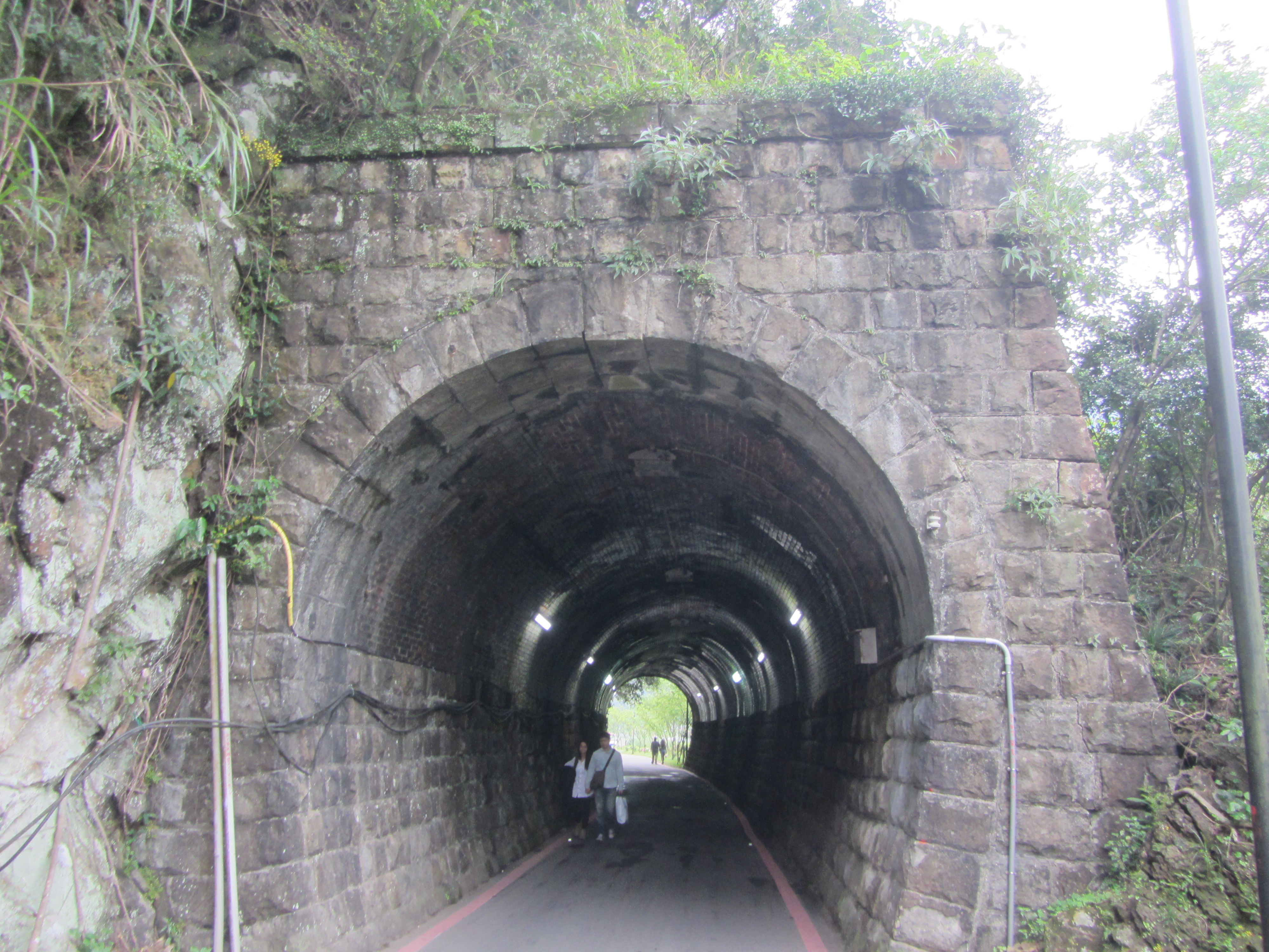 舊宜蘭線猴硐隧道群中的猴硐隧道